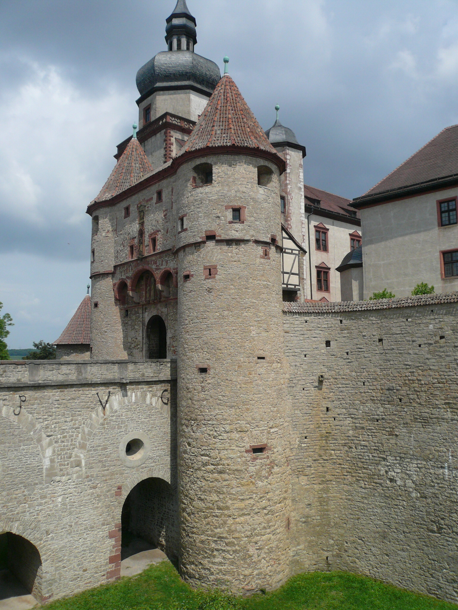 Unter Otto II. von Wolfskeel (1333–1345) errichtetes Eingangsbollwerk der Festung Marienberg, welches unter Rudolf II. von Scherenberg (1466–1495) verstärkt worden ist.